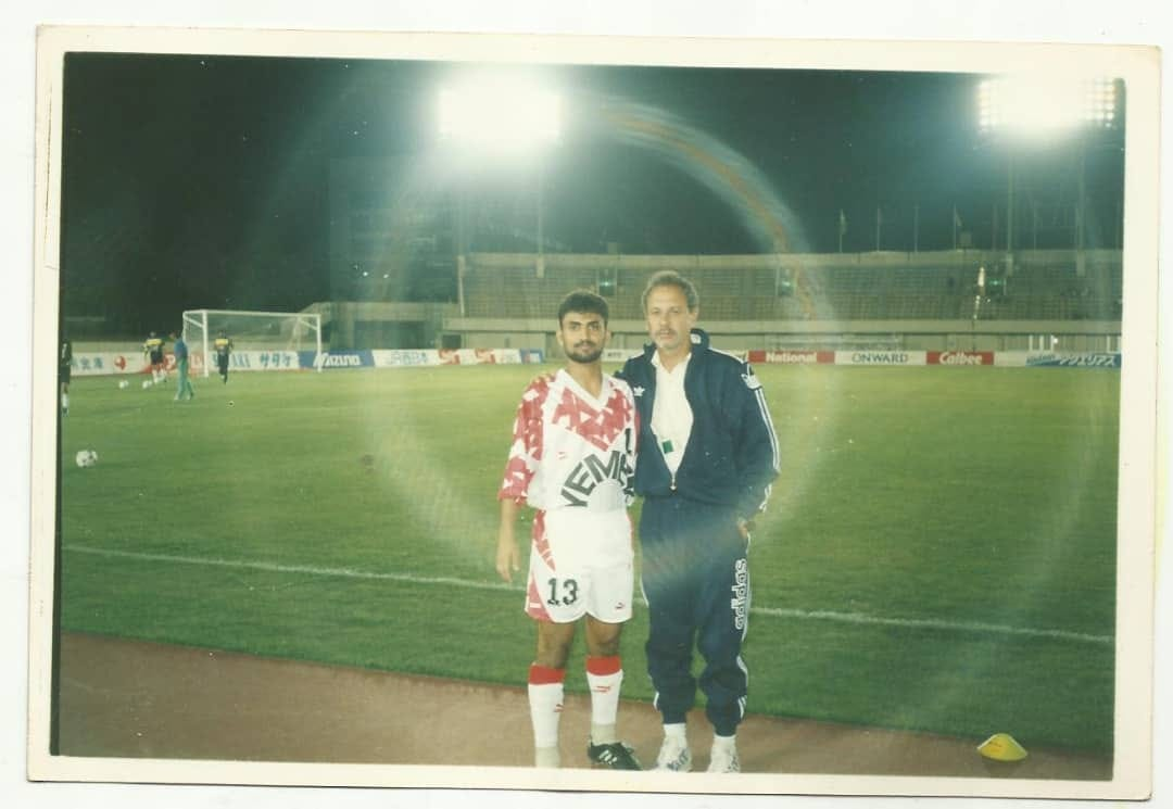 الكابتن اسعد مع مدرب المتخب اليمني هومبورتو عام 1994 بالألعاب الآسوية هيروشيما